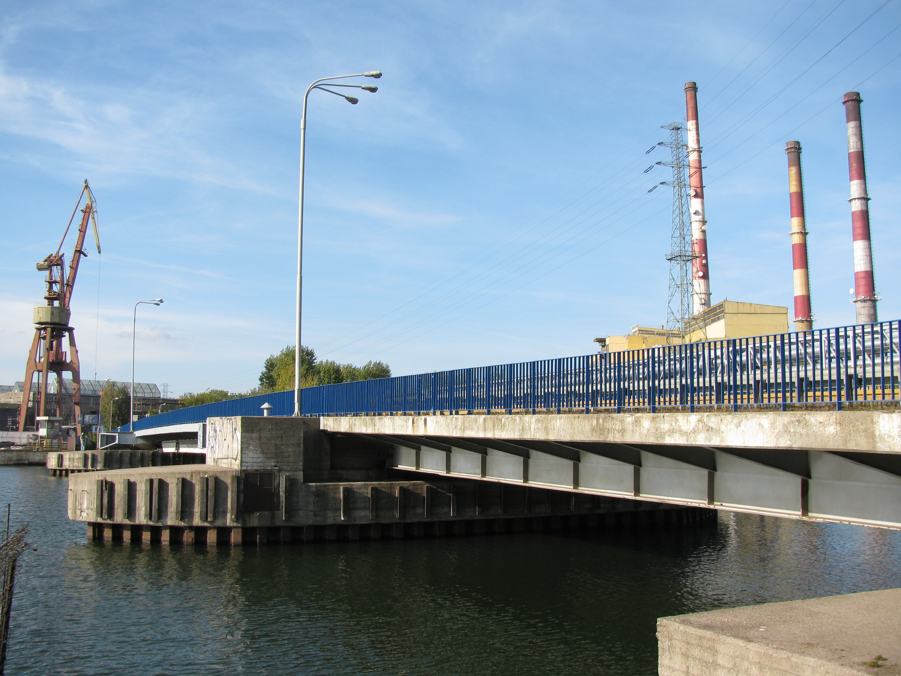 Gdańsk Młyniska, most zachodni na wyspę Ostrów. Po lewej żuraw w Stoczni Północnej.